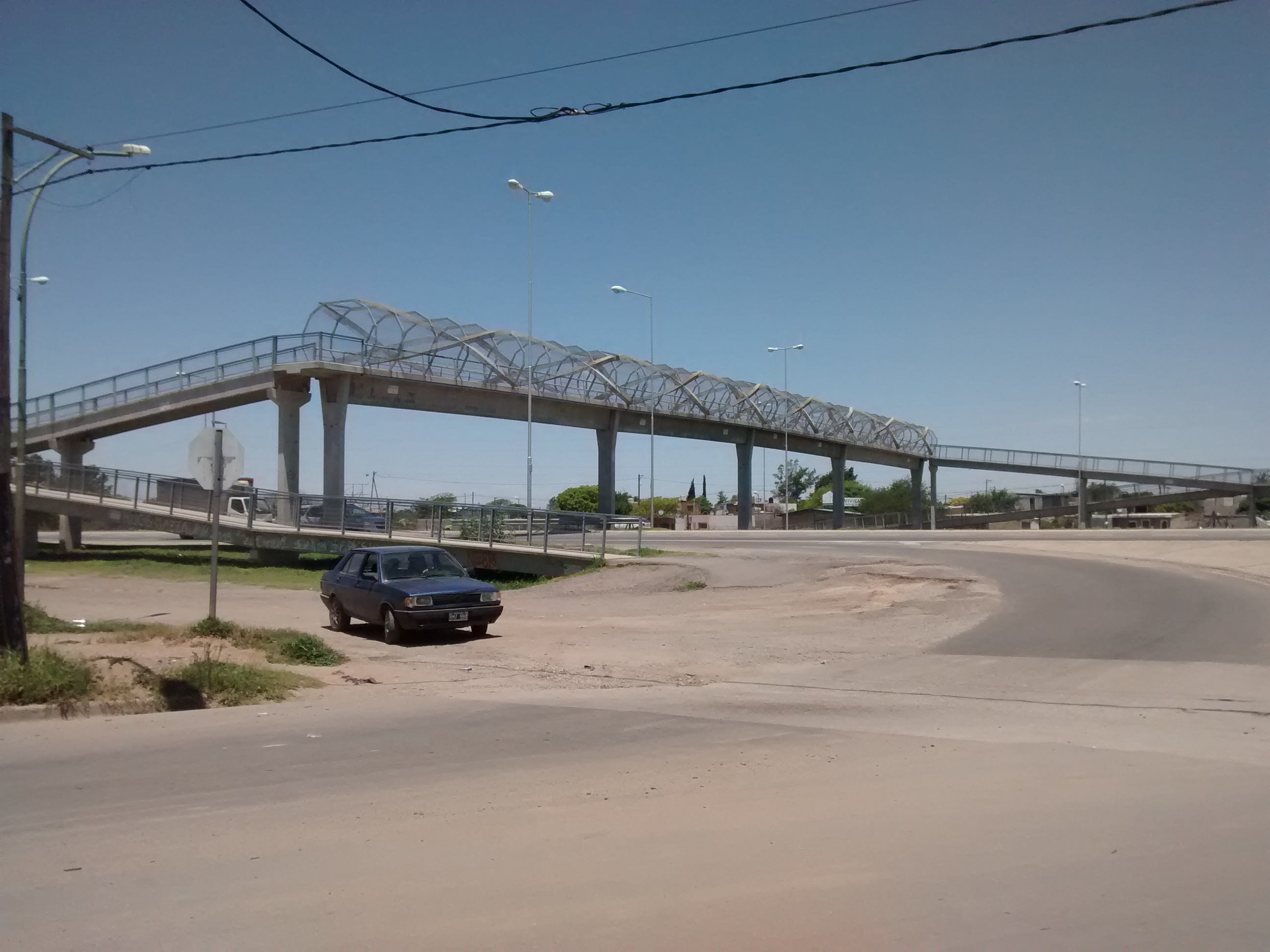 Puente sobre la Ruta Nacional 19 de Malvinas Argentinas, Córdoba, departamento Colón. La ruta divide prácticamente en dos al municipio. Tomada desde Avenida San Martín Mirando al sur.